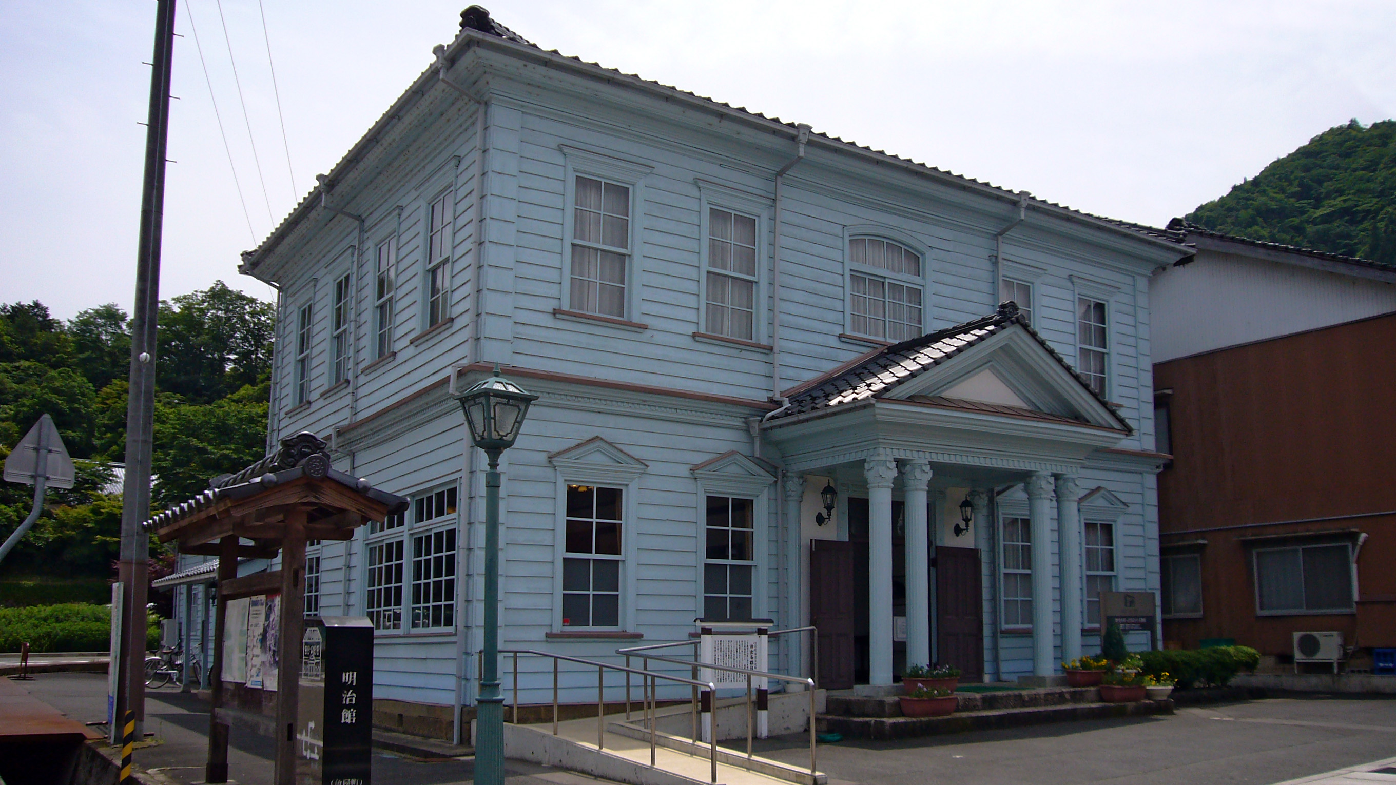 Meiji-Kan in Toyooka, Hyogo, Japan